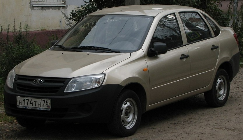 Lada-Granta